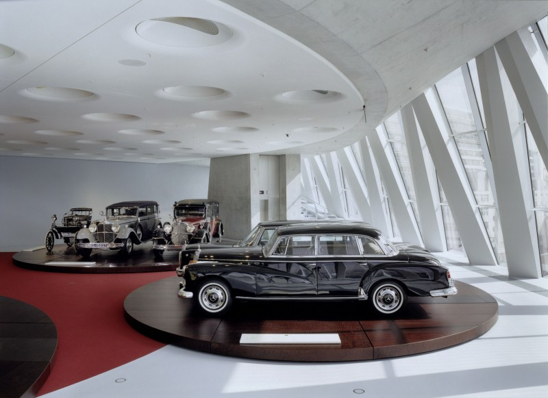 Mercedes-Benz Welt